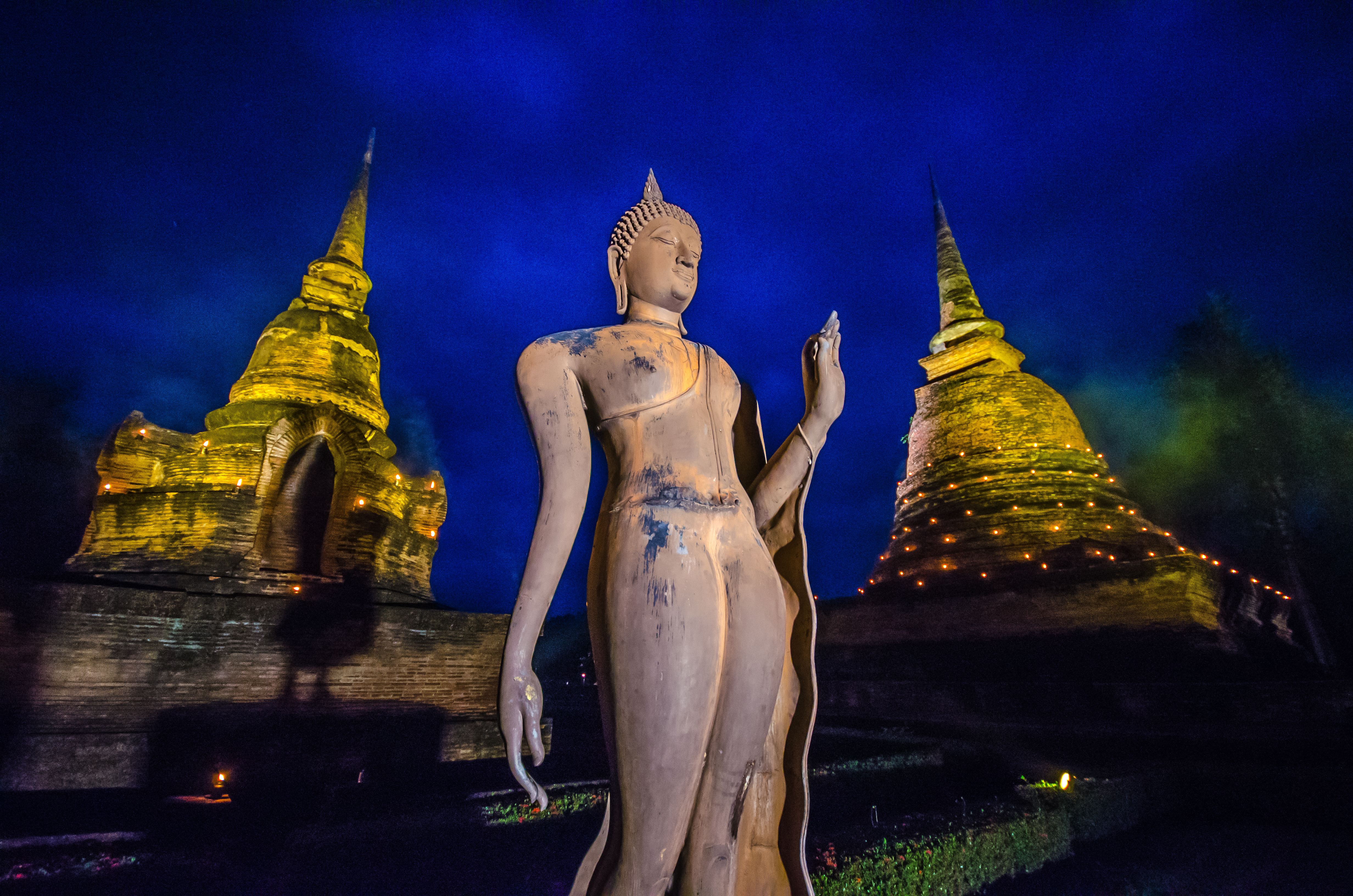 วัดสระศรี(กระพังโพยศรี)